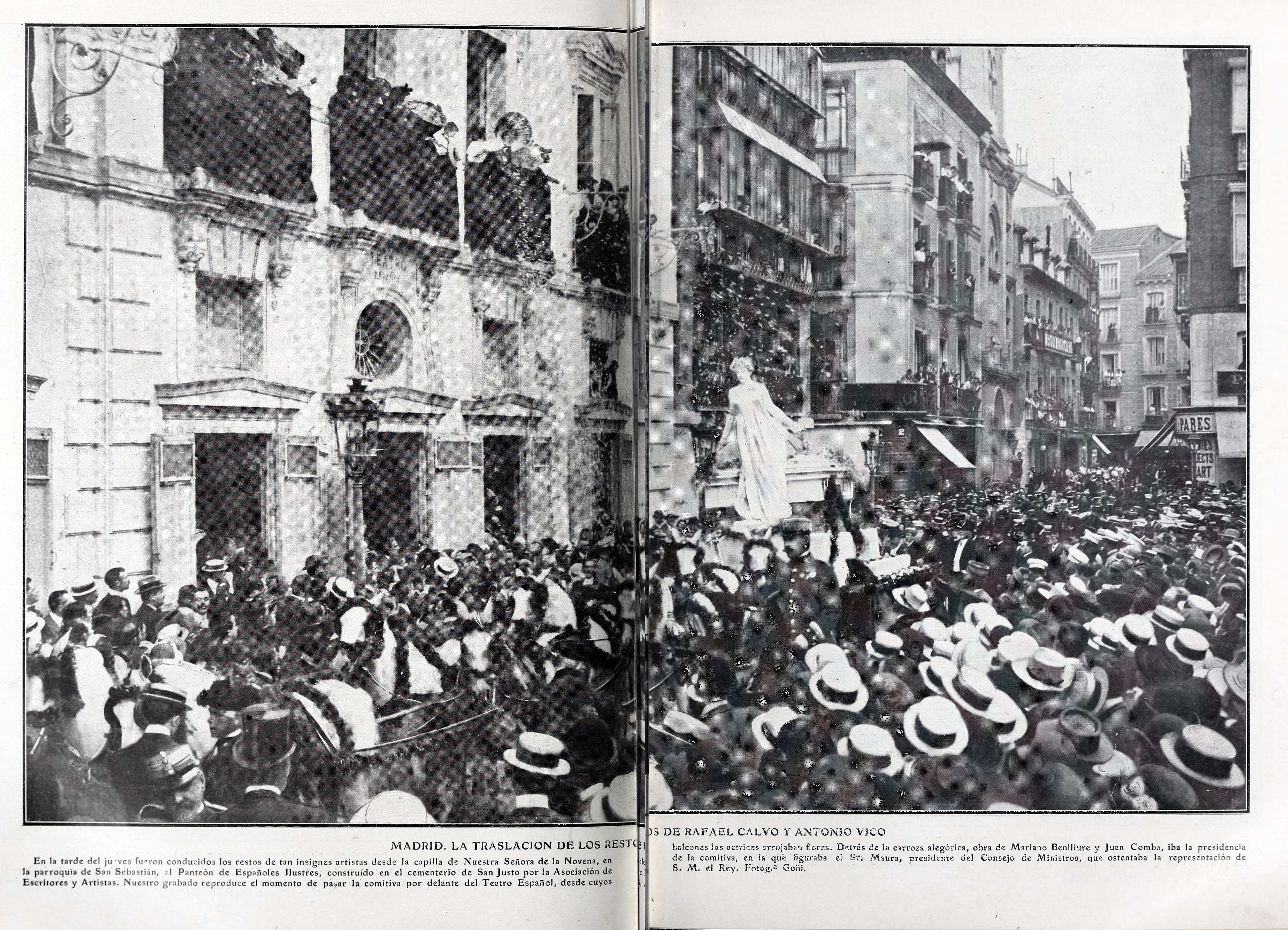 En la tarde del jueves fueron conducidos los restos de tan insignes artistas desde la capilla de Nuestra Señora de la Novena en la parroquia de San Sebastián, al Panteón de Españoles Ilustres, construido en el cementerio de San Justo por la Asociación de Escritores y Artistas. Nuestro grabado reproduce el momento de pasar la comitiva por delante del Teatro Español. desde cuyos balcones las actries arrojaban flores. Detrás de la carroza alegórica, obra de Mariano Benlliure y Juan Comba, iba la presidencia de la comitiva, en la que figuraba el Sr. Maura, presidente del Consejo de Ministros, que ostentaba la representación de S. M. el Rey. Fotog.ª Goñi